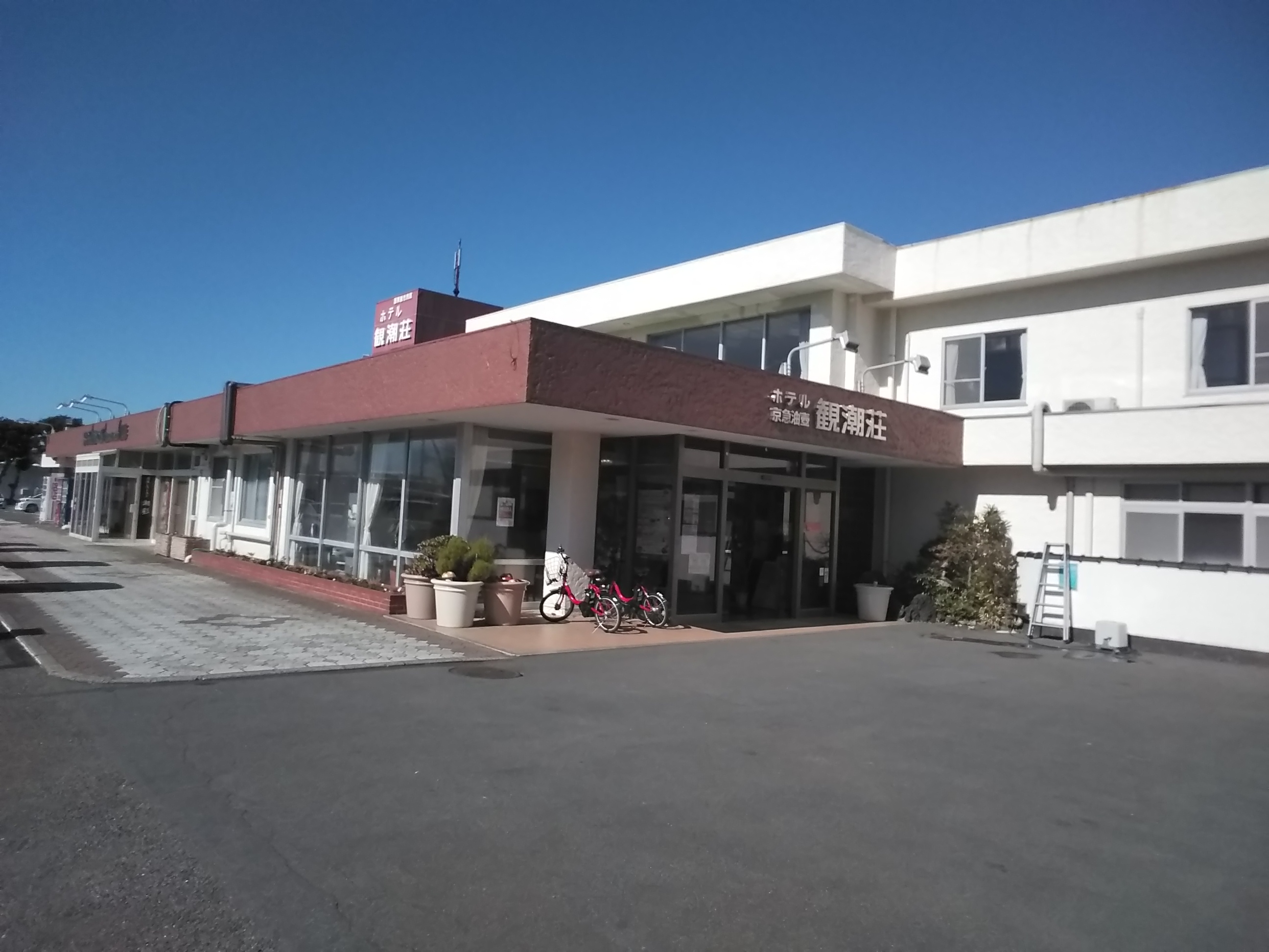 神奈川県三浦市、「ホテル京急油壺 観潮荘」（油壺温泉）